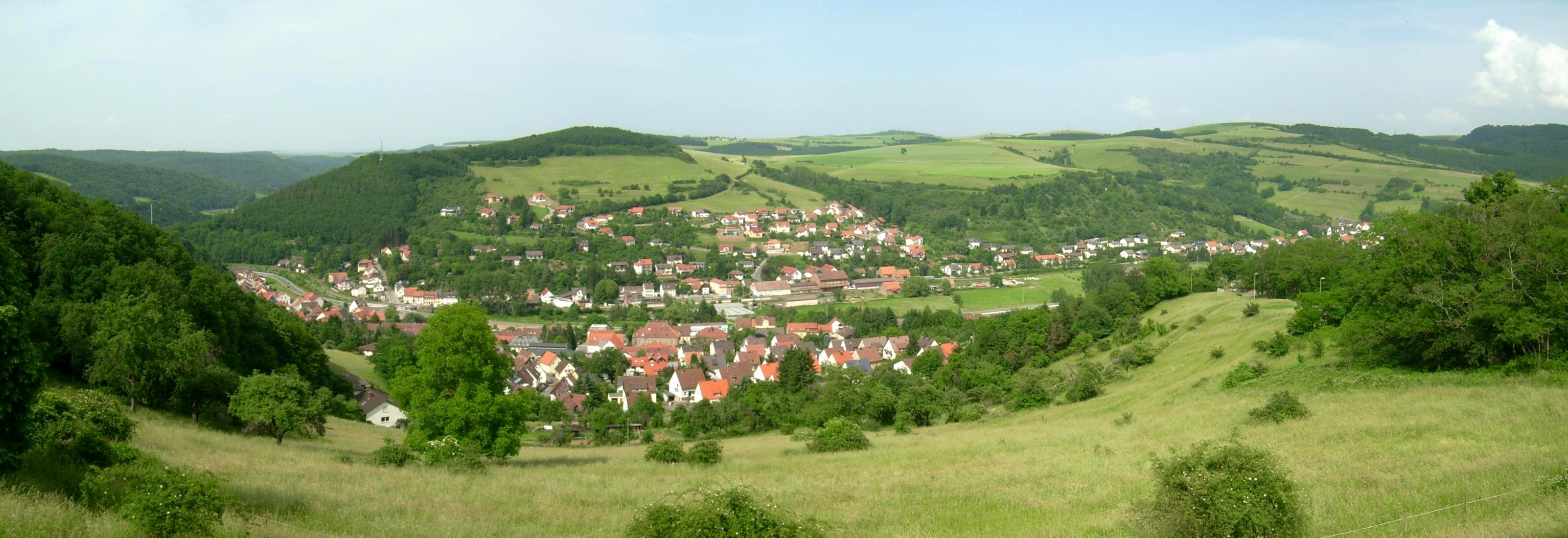 Panoramablick von der Jugendherberge auf Wolfstein